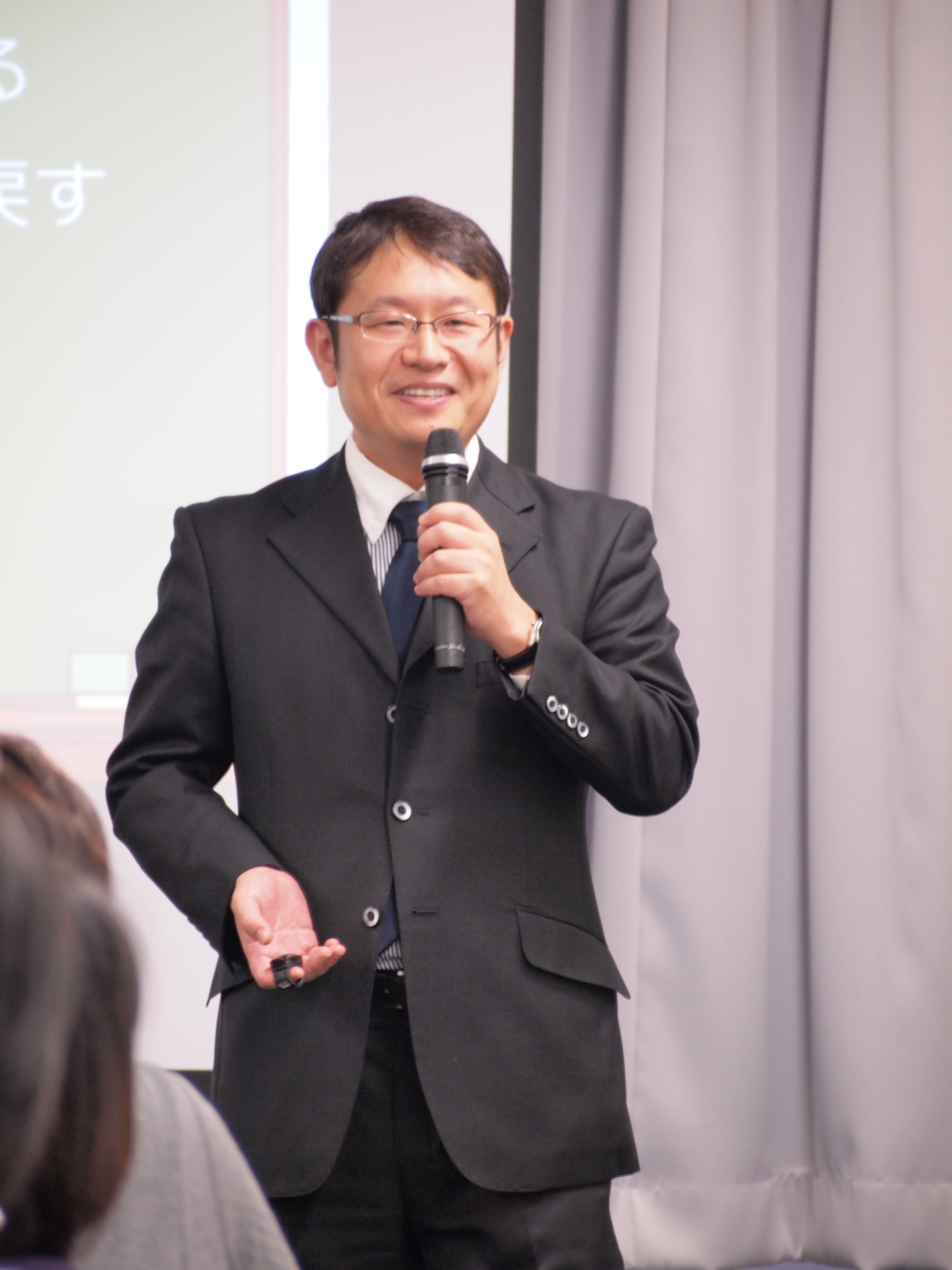 中学受験情報局 関西セミナー